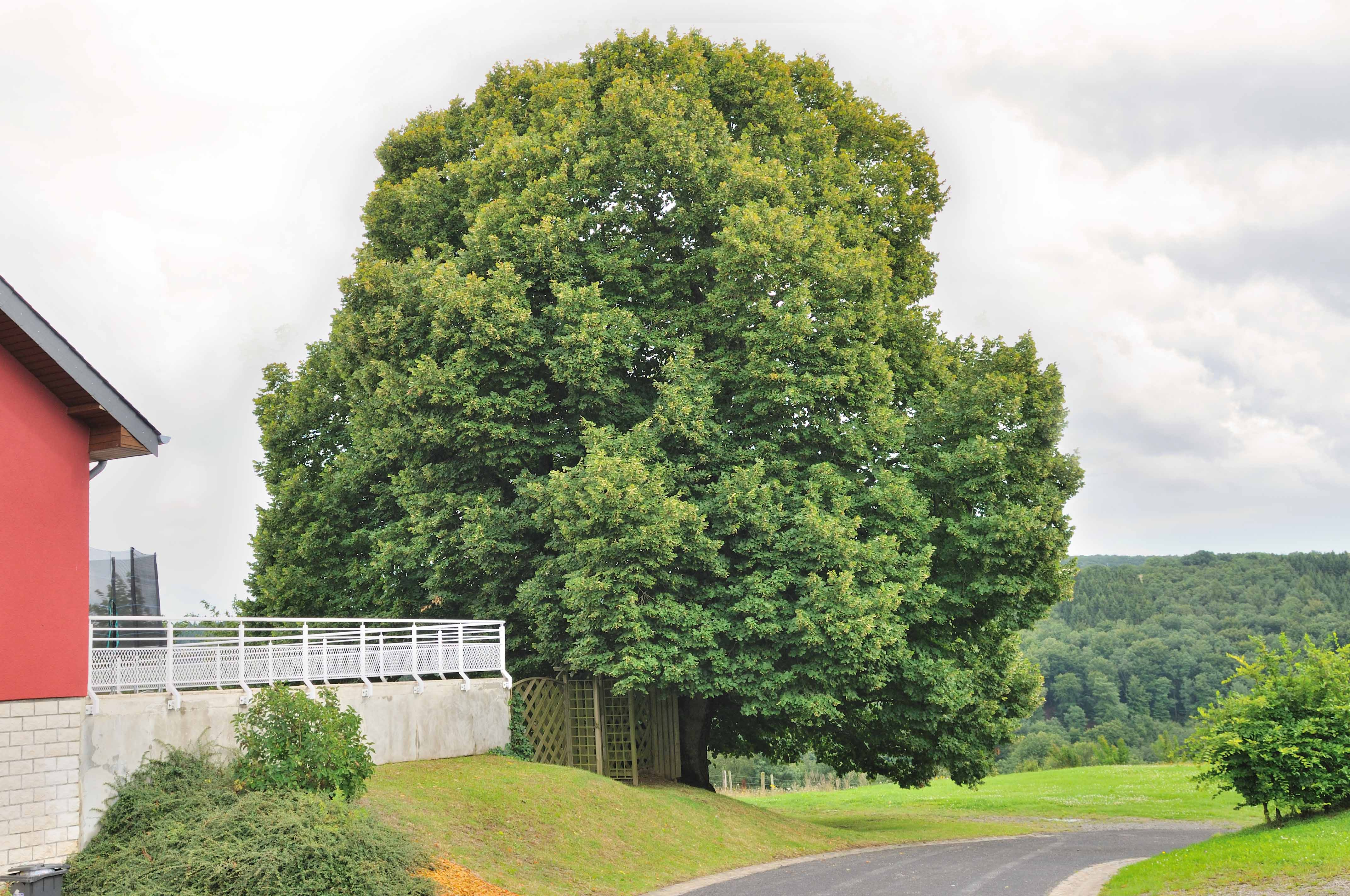 Lann zu Pëtscht.